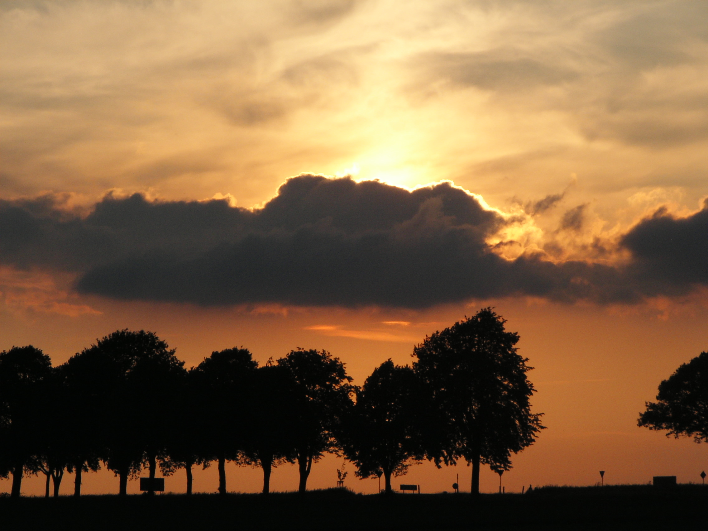 B216 bei Sonnenuntergang